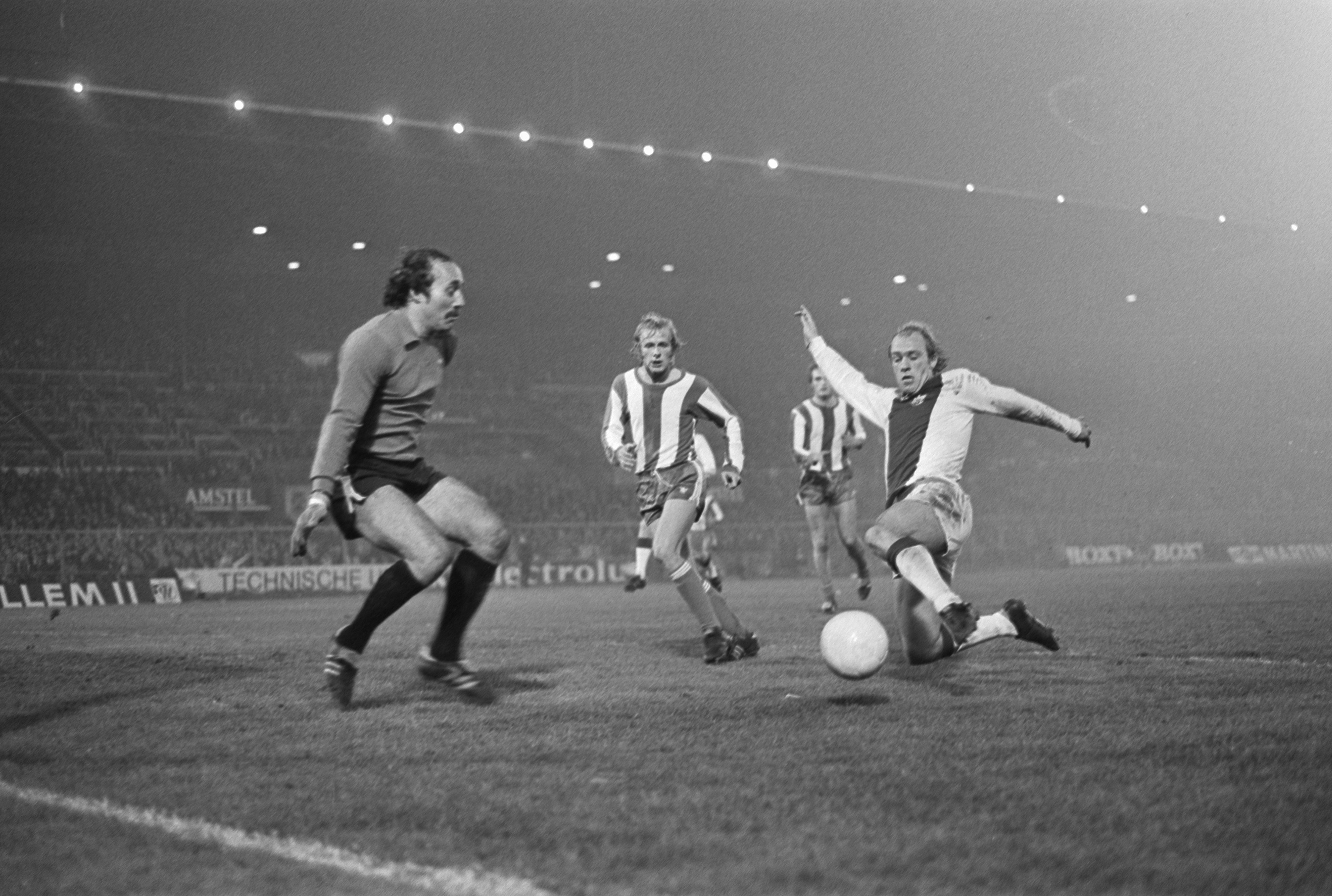 Collectie / Archief : Fotocollectie Anefo Reportage / Serie : [ onbekend ] Beschrijving : Ajax tegen Hertha BSC 4-1 Uefa; spelmomenten Datum : 5 november 1975 Trefwoorden : sport, voetbal Persoonsnaam : Hertha Bsc Instellingsnaam : UEFA Fotograaf : Peters, Hans / Anefo Auteursrechthebbende : Nationaal Archief Materiaalsoort : Negatief (zwart/wit) Nummer archiefinventaris : bekijk toegang 2.24.01.05 Bestanddeelnummer : 928-2559